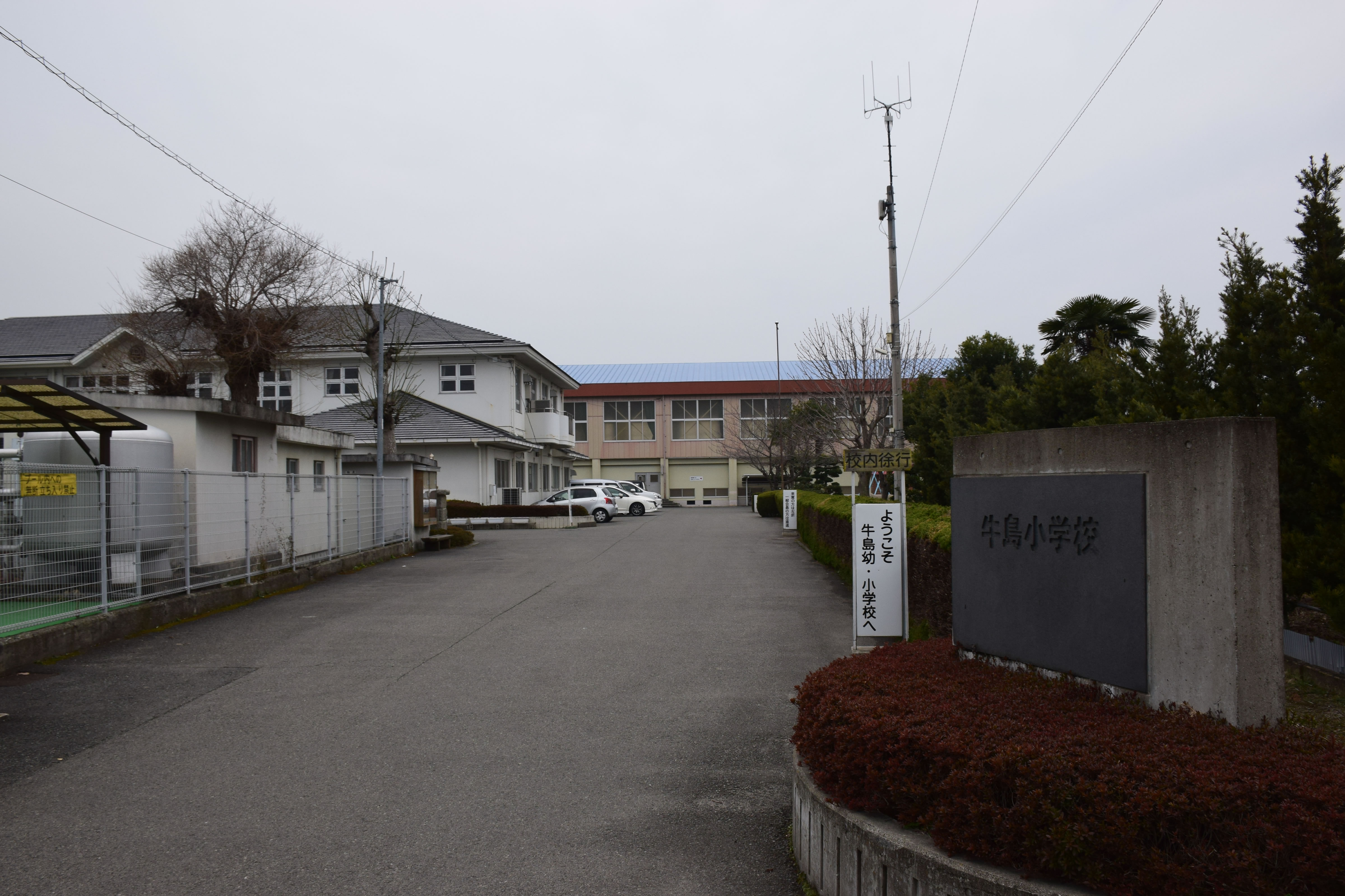 吉野川市立牛島小学校